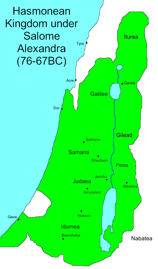 Categorie:Kaart Categorie:Afbeelding oudheid (Original text: Rijk van de Hasmoneeën)